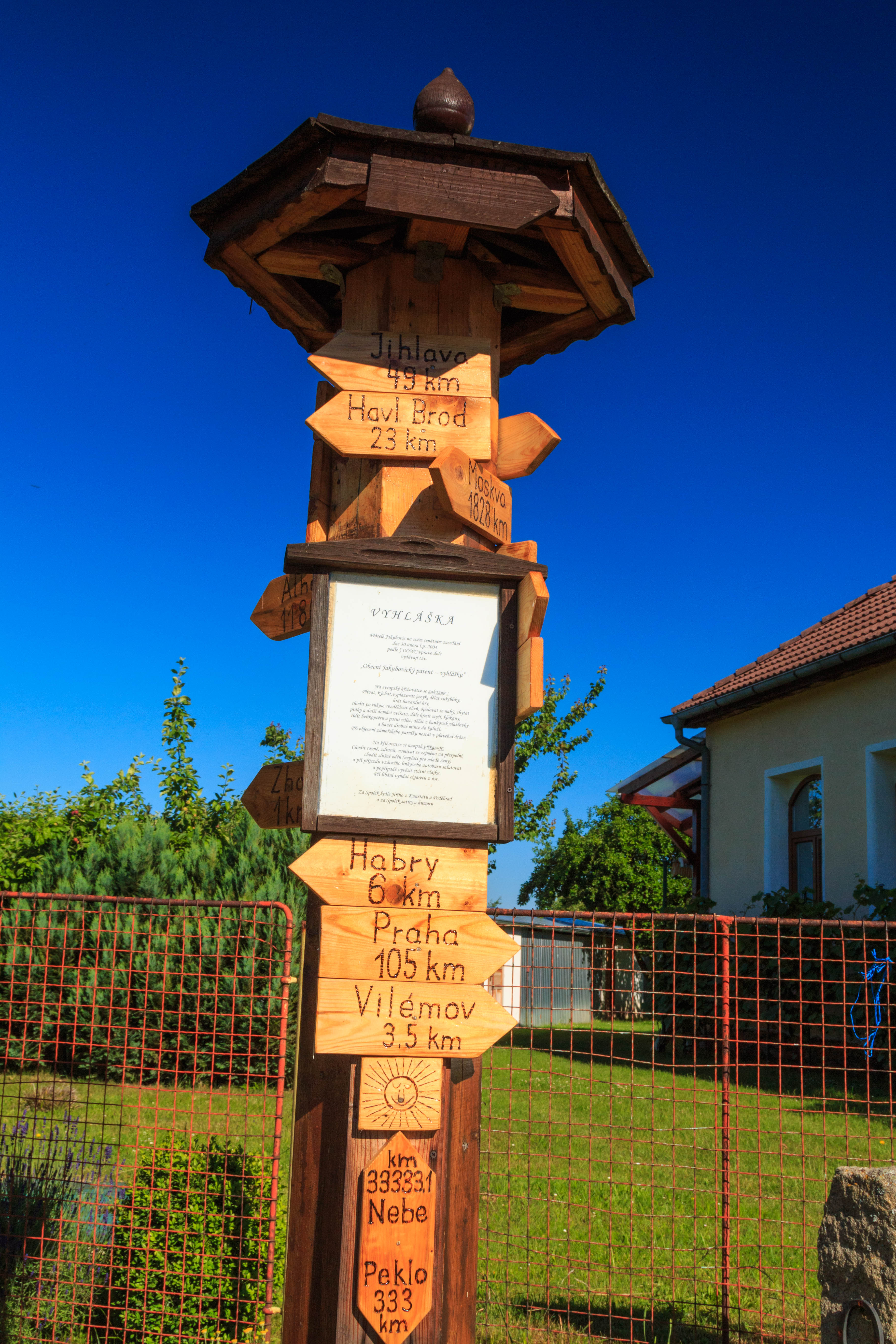 Jakubovice u Vilémova směrovník